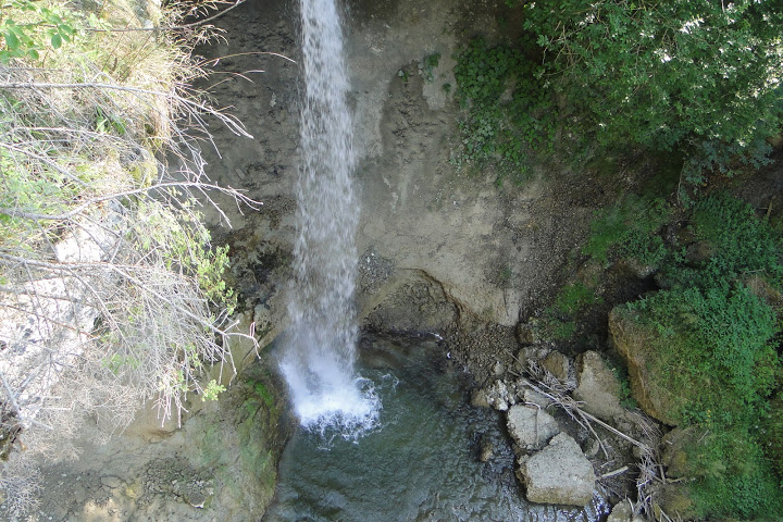 Scheidegg Wasserfall